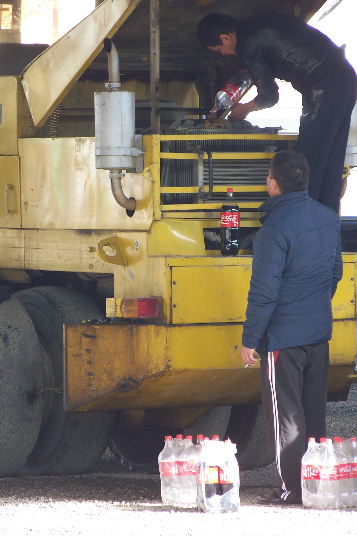 Заливка Кока-Колы в виброкаток